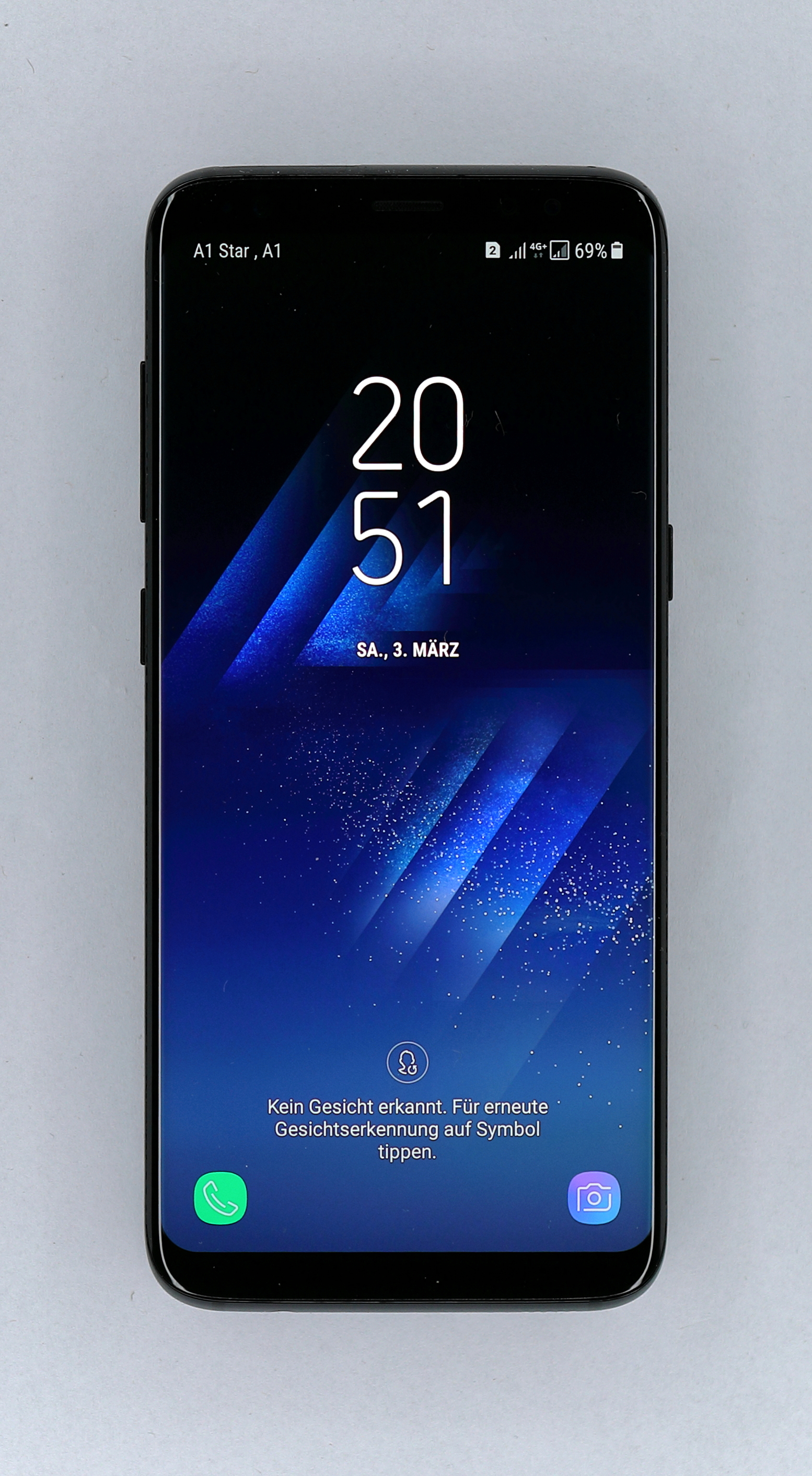 Das Smartphone Samsung Galaxy S8 Duos (SM G950FD) mit Anmeldebildschirm (Gesichtserkennung).